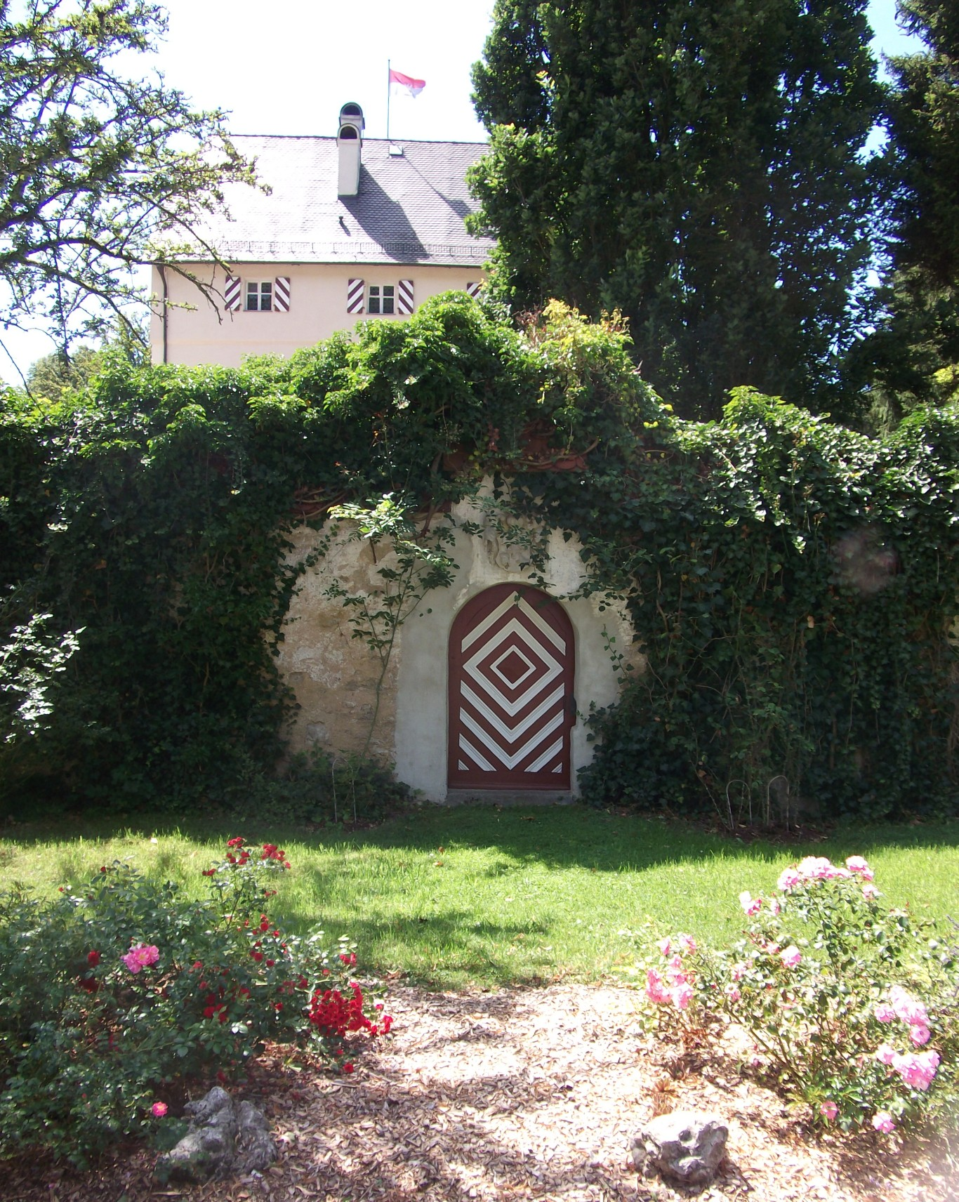 Eingang zum Schloß Artelshofen